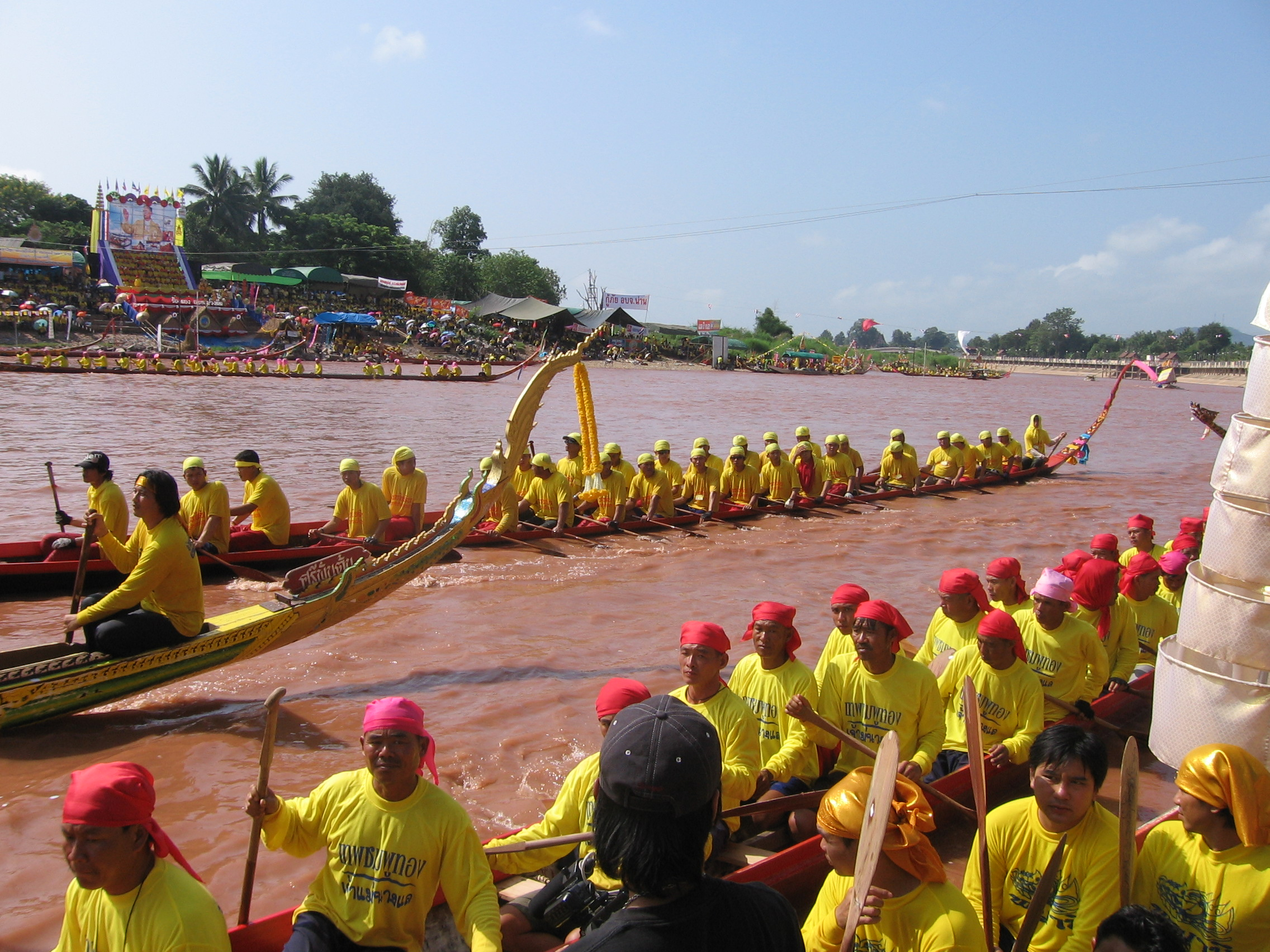 Régate,_Nan.jpg